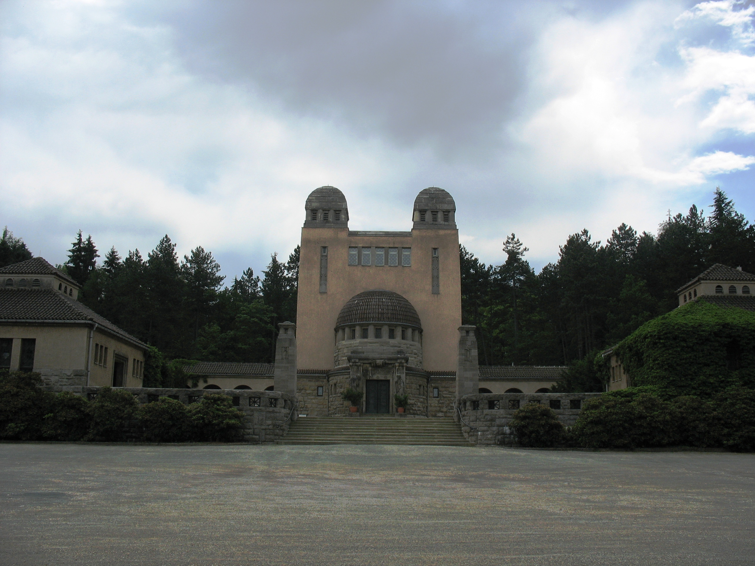 Plauen, Krematorium des Hauptfriedhofs (Kleinfriesener Straße 14).